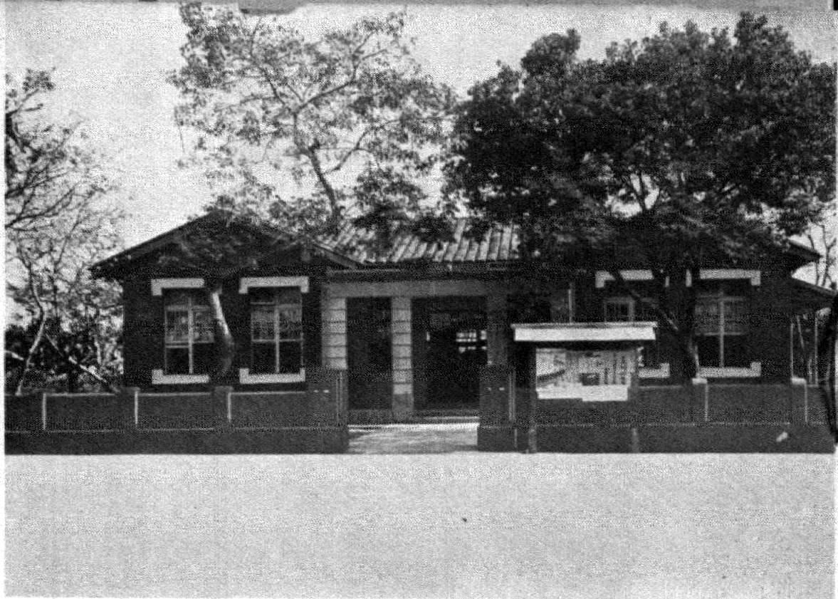 中文（台灣）: 新埤庄役場